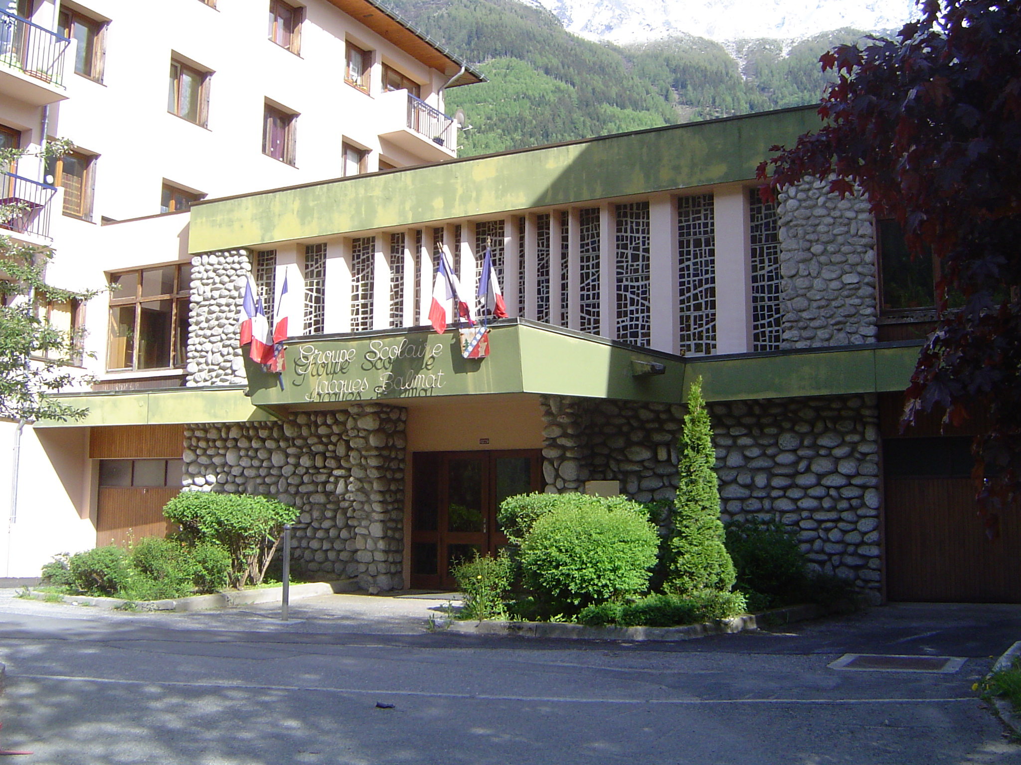 Photo prise dans le quartier des Pélerins à Chamonix-Mont-Blanc (France)